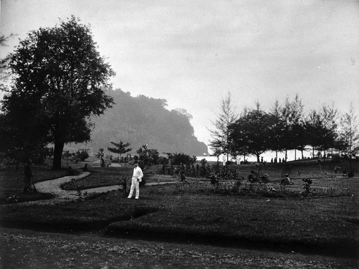 Foto. Park aan het water, Moearapadang, Sumatra`s Westkust of Residentie Palembang?